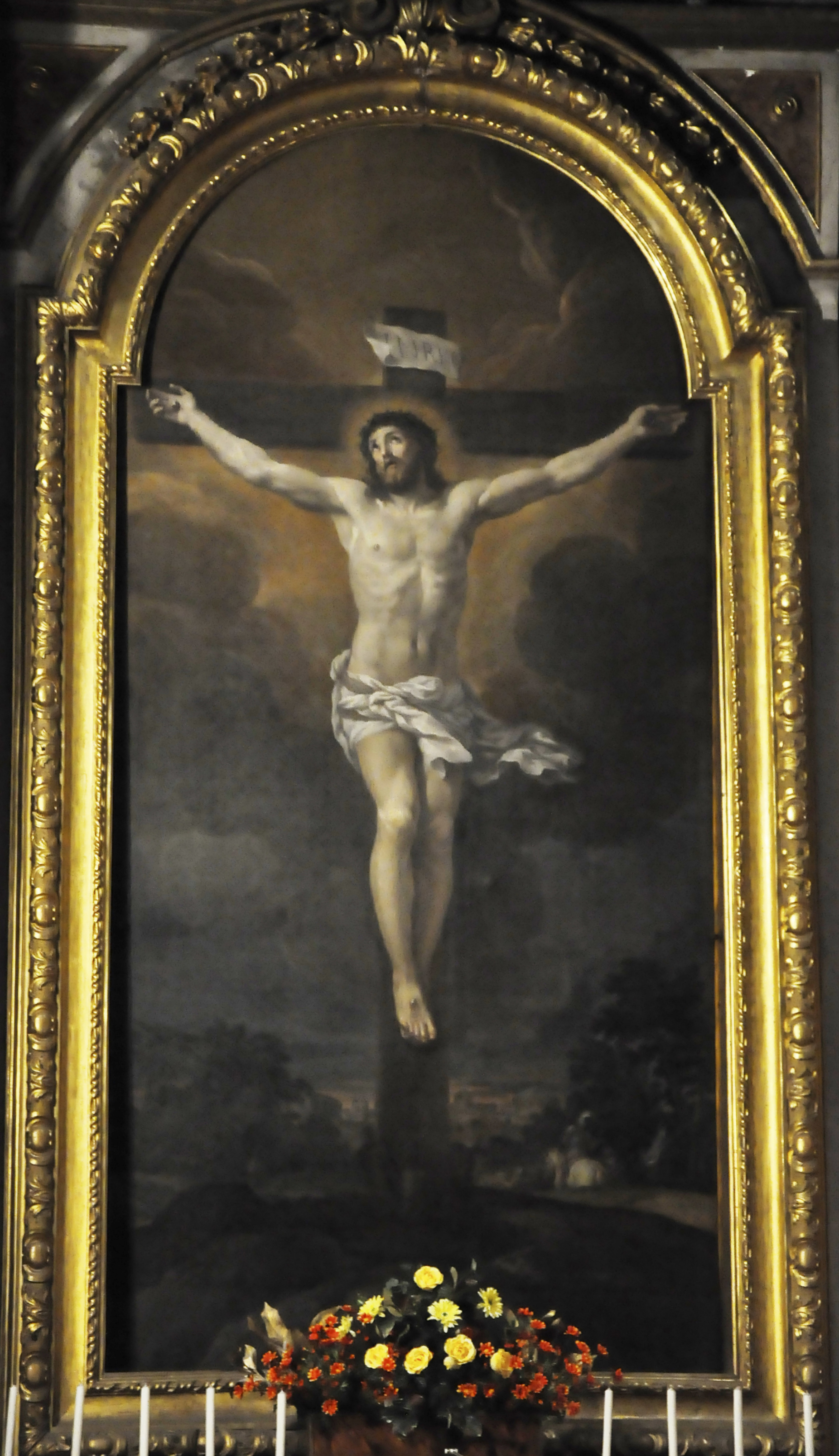 Kruisiging (1680) van Ciro Ferri in de Santa Maria dell'Orazione e Morte, Rome